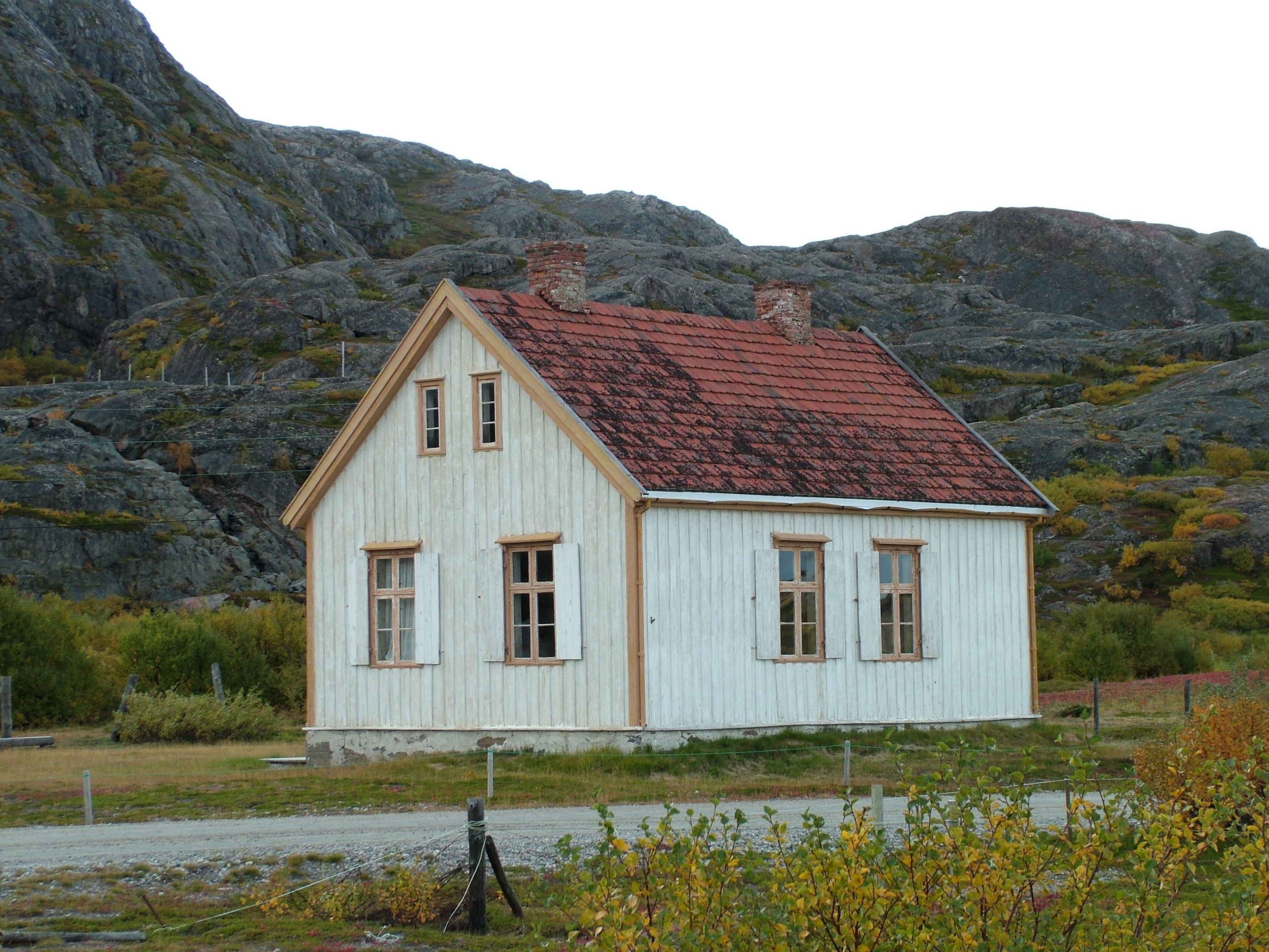 Grense Jakobselv, Kirkenes, Das PfarrhausNorsk bokmål: Gammel prestegård i Grense Jakobselv